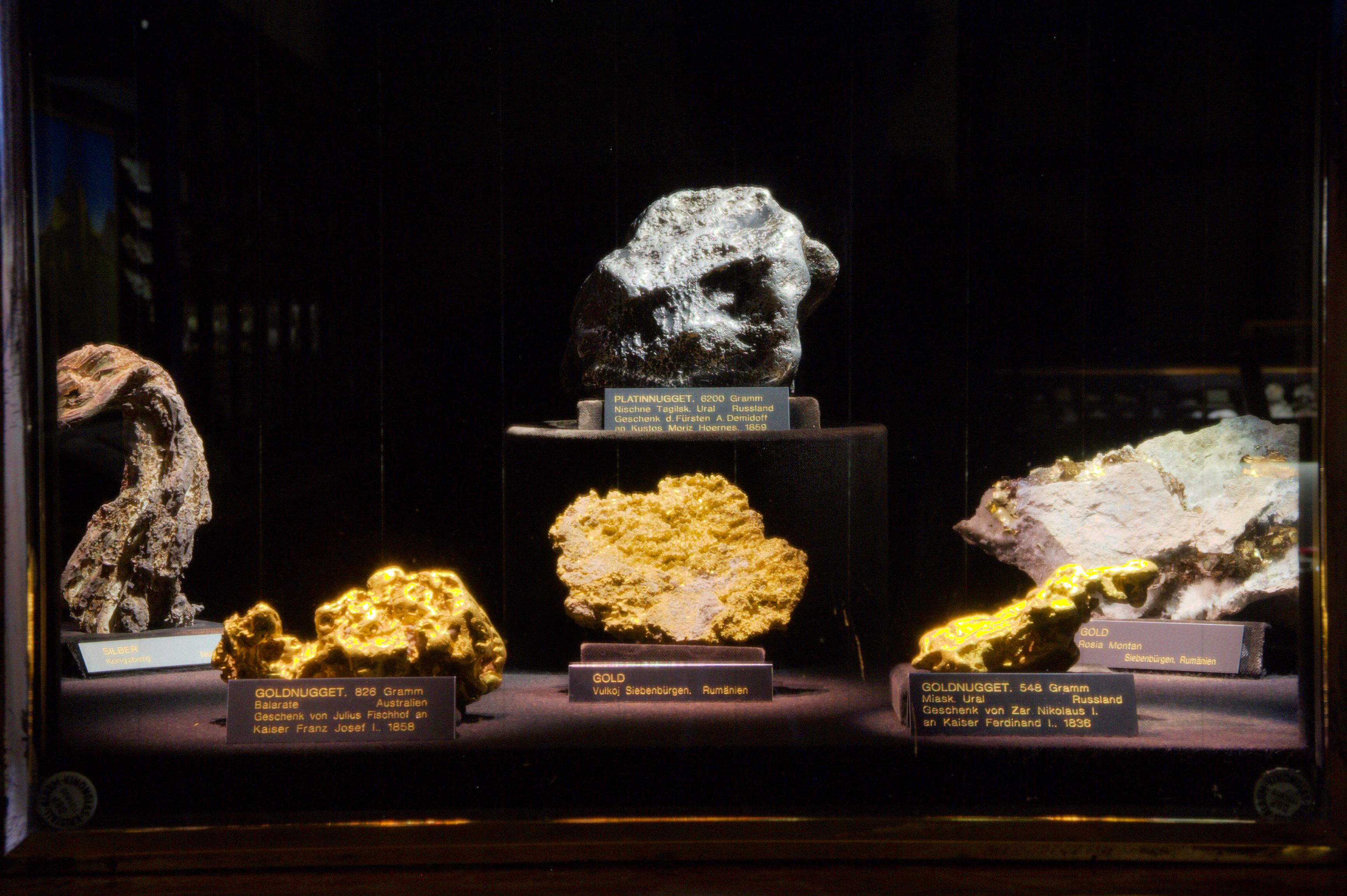 Nuggets im Naturhistorischen Museum Wien